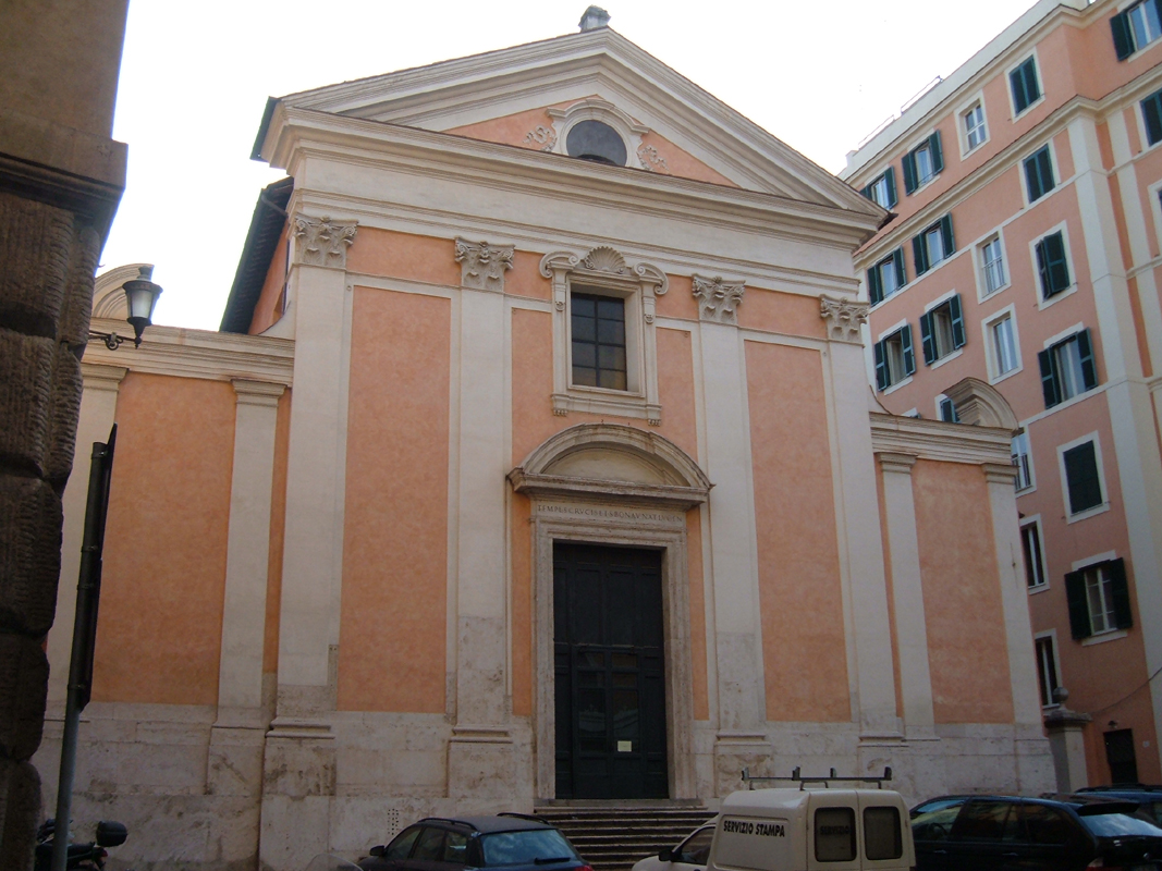 Chiesa di Santa Croce e di San Bonaventura dei Lucchesi, a Roma, nel rione Trevi. Foto personale.